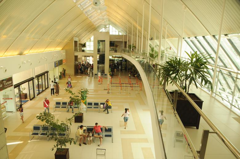 Saguão do Aeroporto de Cruziero do Sul - Acre SBCZ